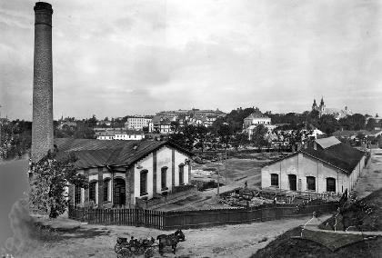 Вулька електростанція.JPG: перша львівська електространція та трамвайне депо